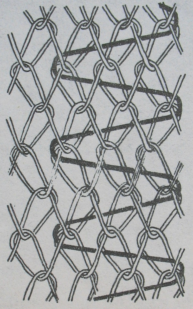 Schema: Schussfaden im Gewirk